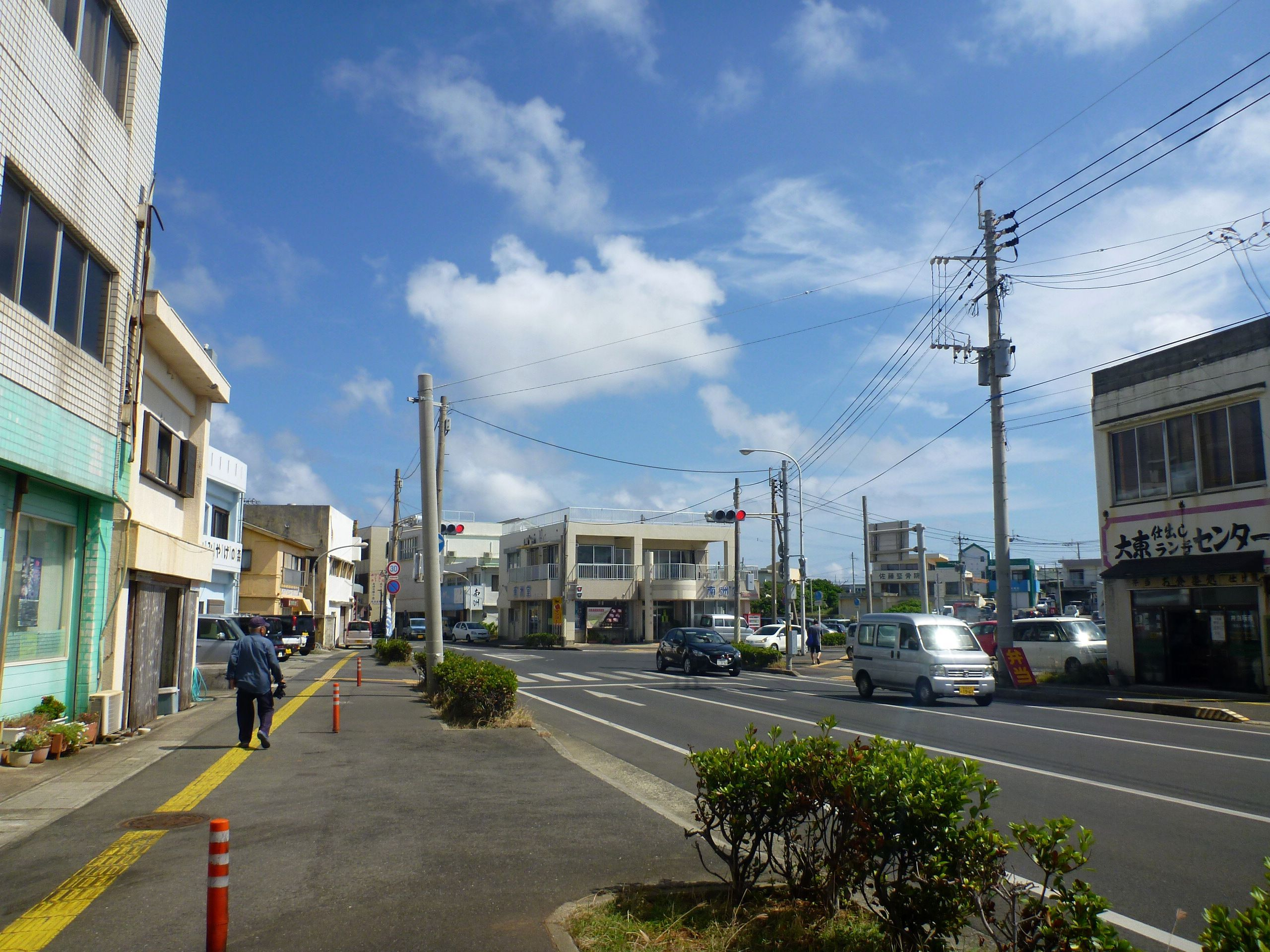 和泊町中心部